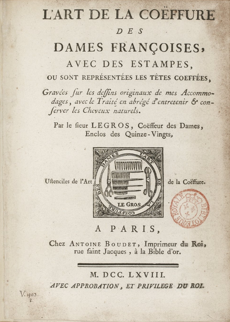 Titelseite von: Legros de Rumigny: L’art de la coëffure des dames françoises, avec des estampes où sont représentées les têtes coeffées. Paris : Antoine Boudet, 1768, pdf.